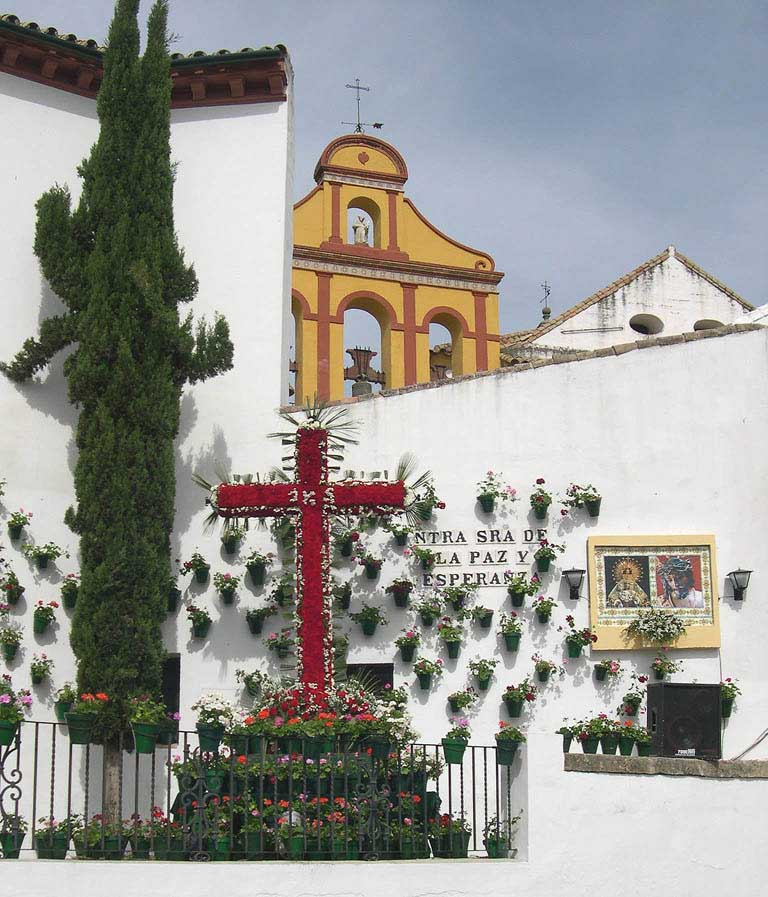 Cruz de mayo de la Cuesta del Bailío, año 2005, en Córdoba (España).